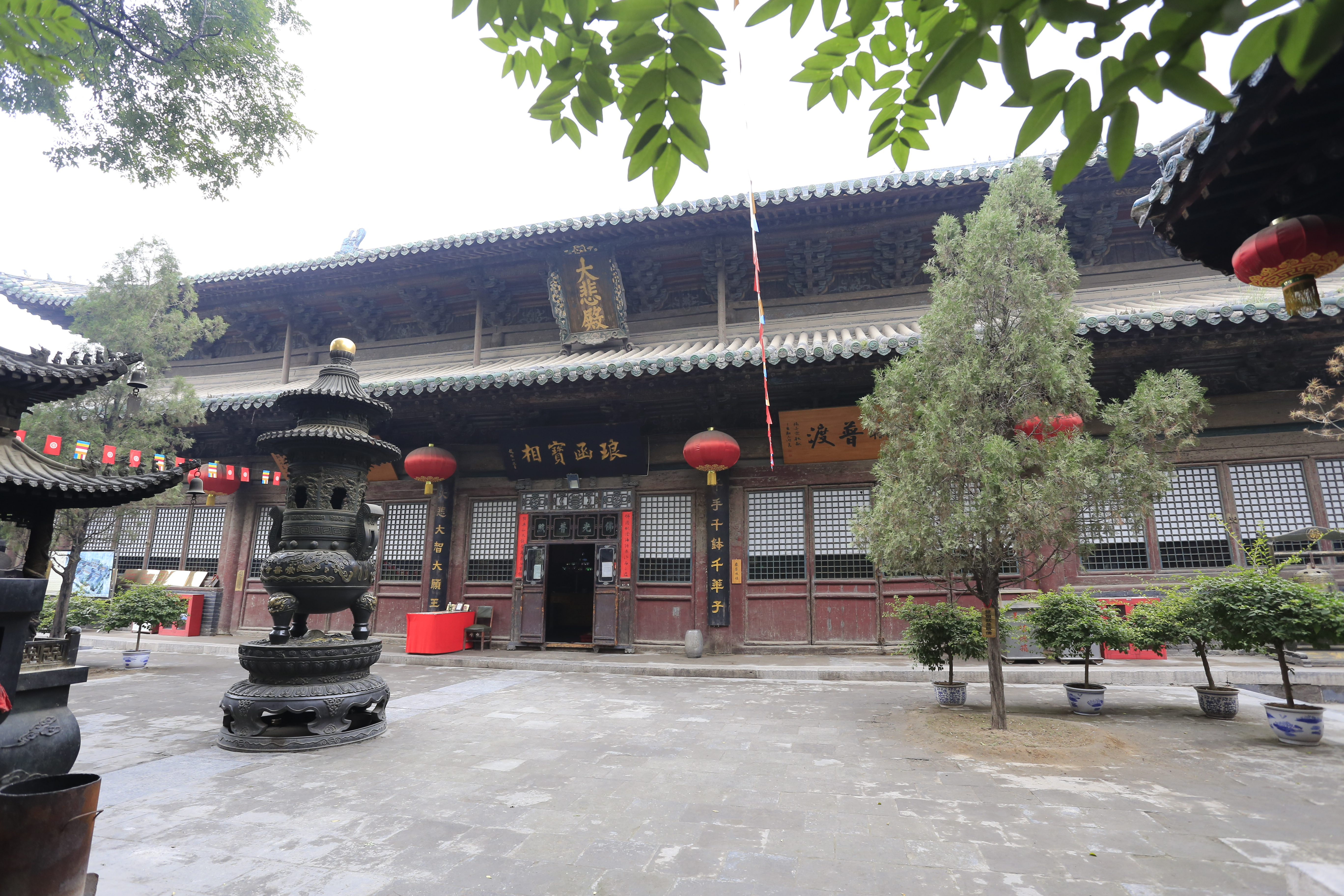 太原崇善寺—— 大悲殿